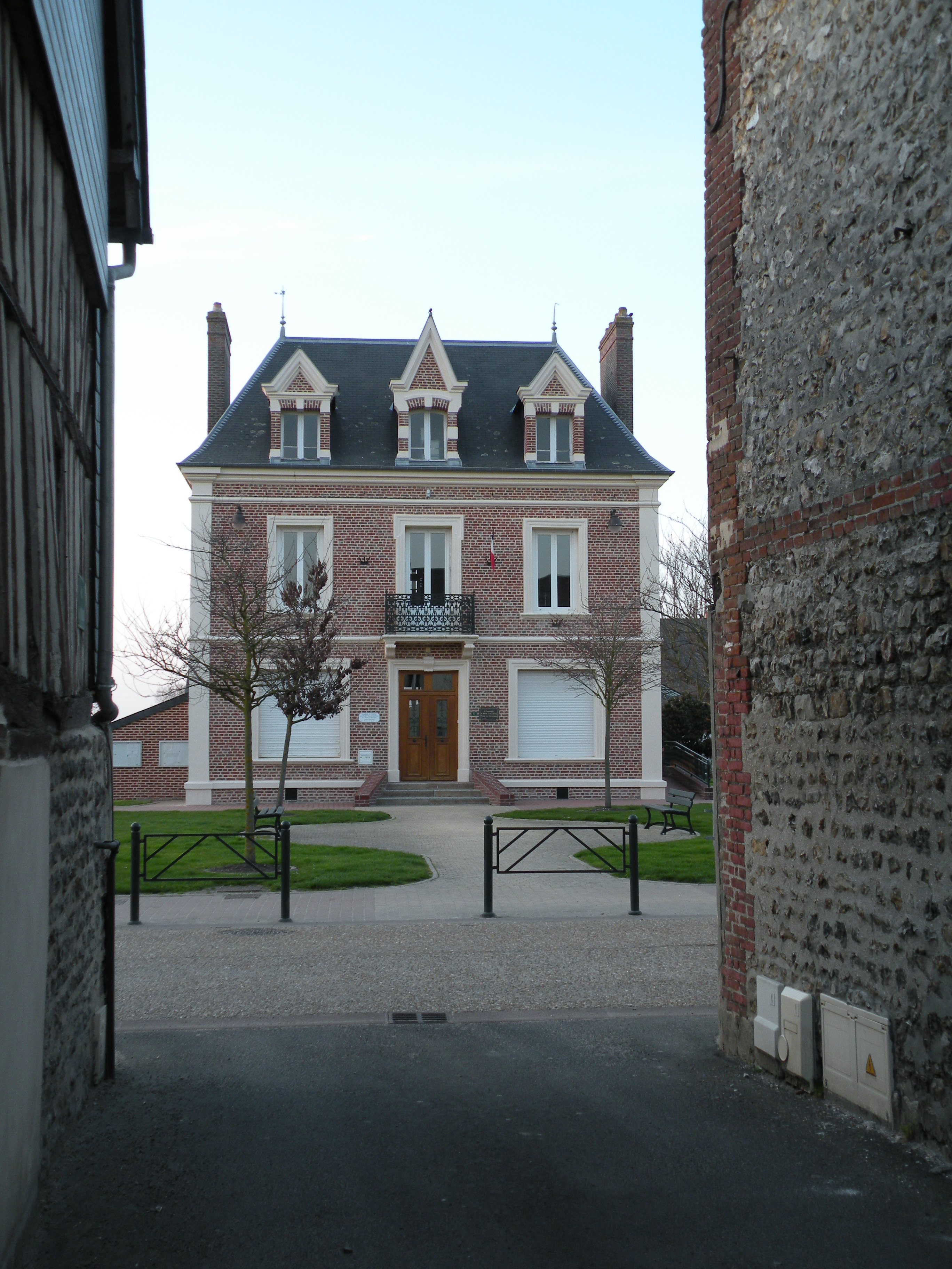 Mairie de La Rivière-Saint-Sauveur.